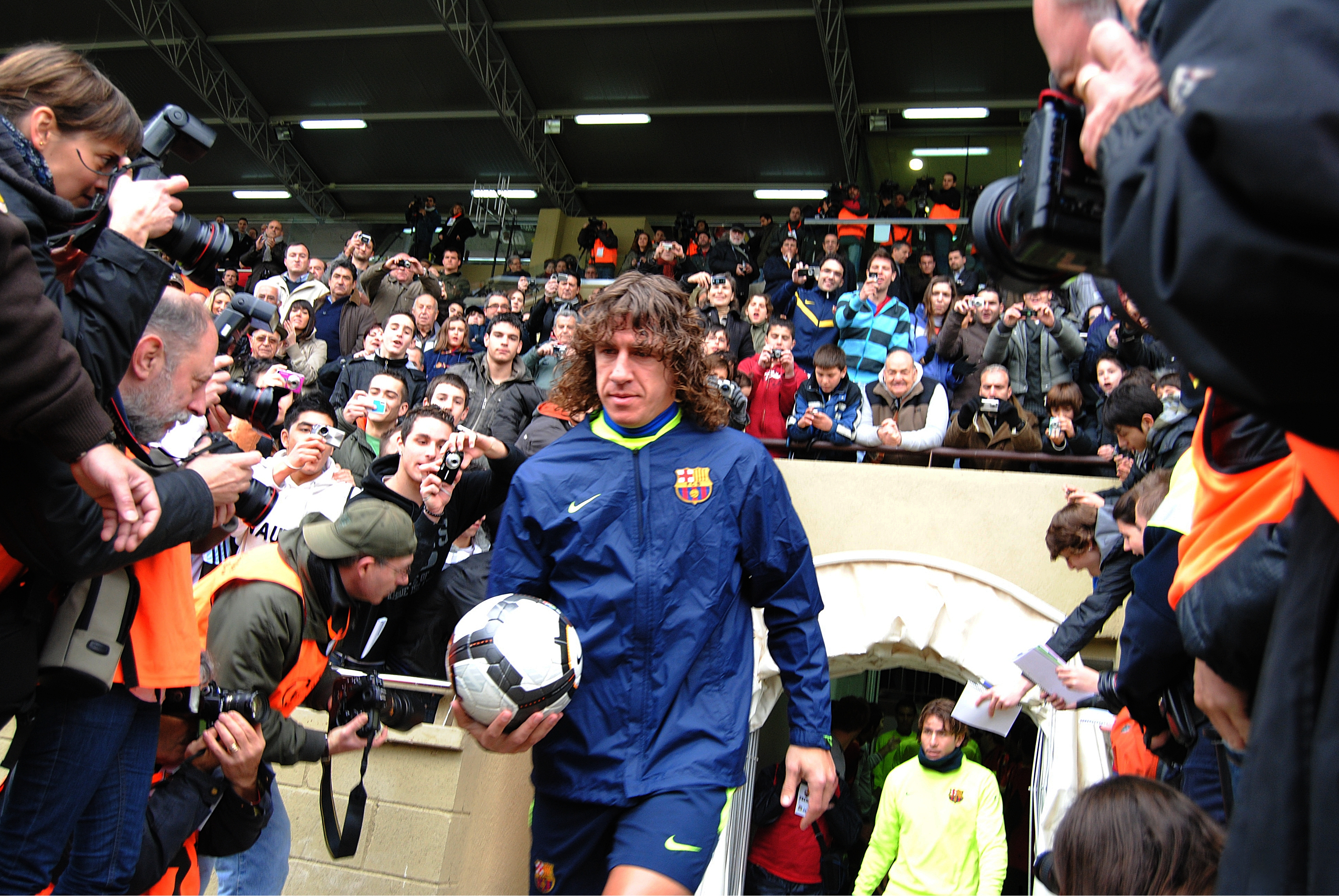 Carles Puyol